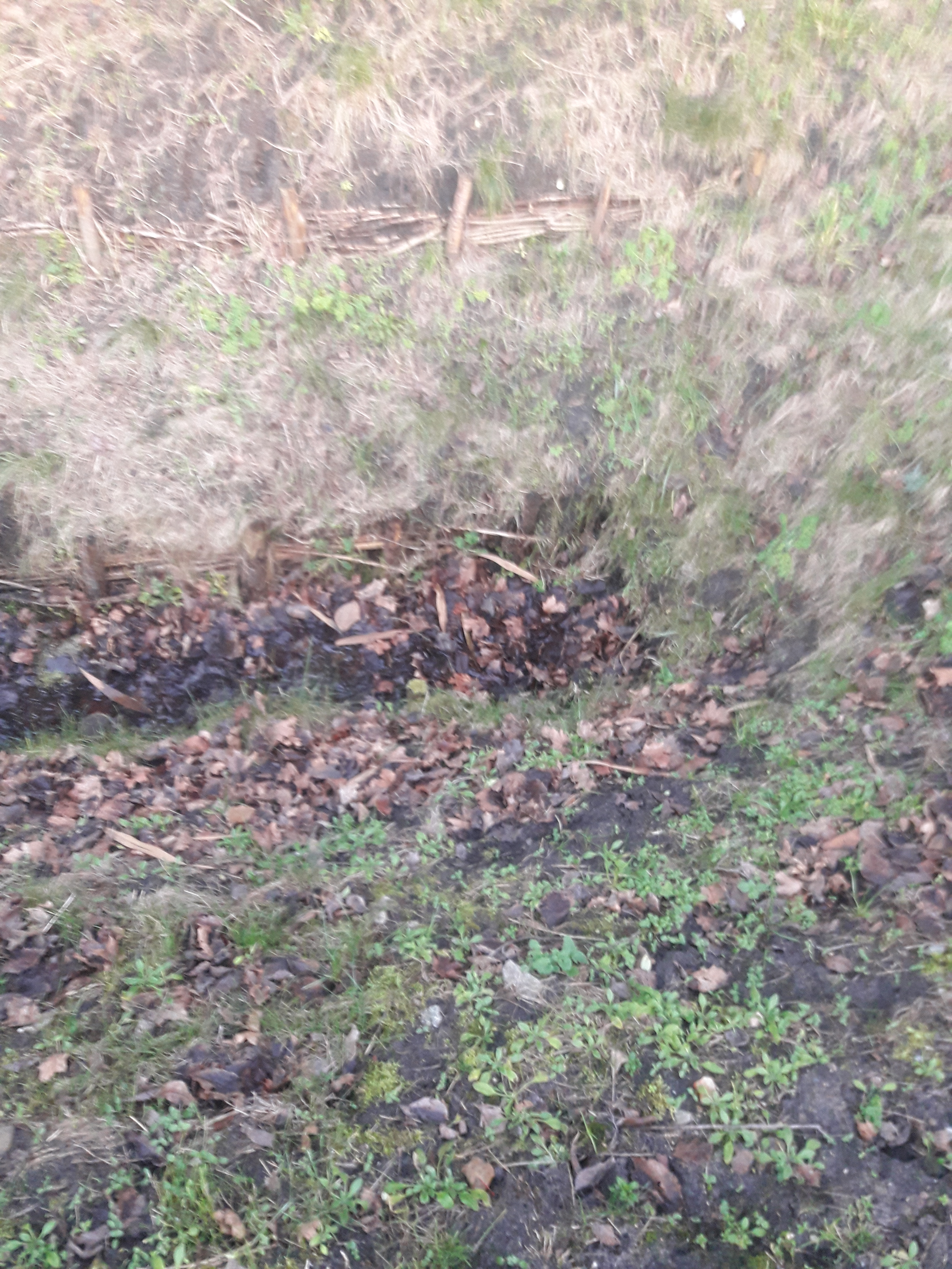 Zdjęcie źródła